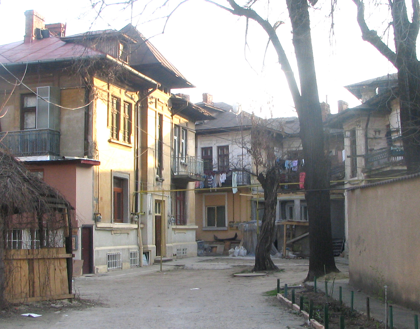 Case vechi, Dudești, București.